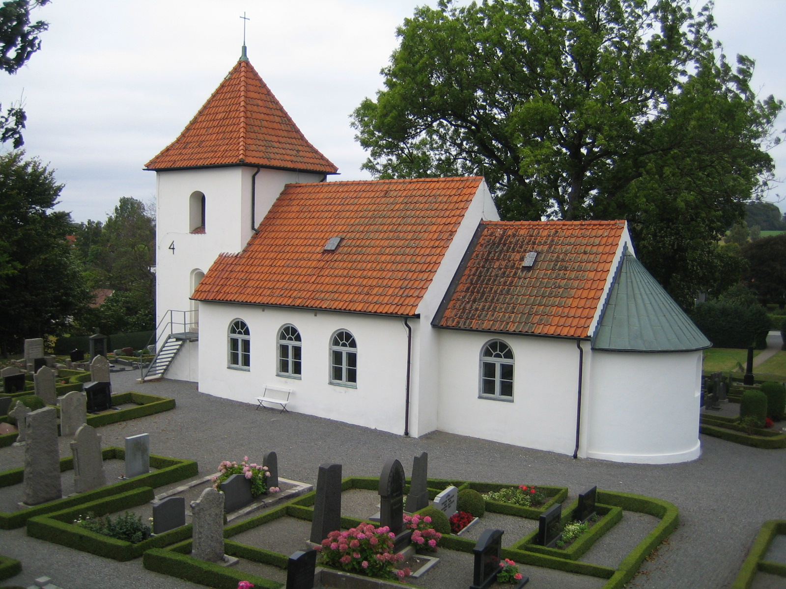 Snårestads kyrka. Bilden tagen av mig själv 11 september 2005.